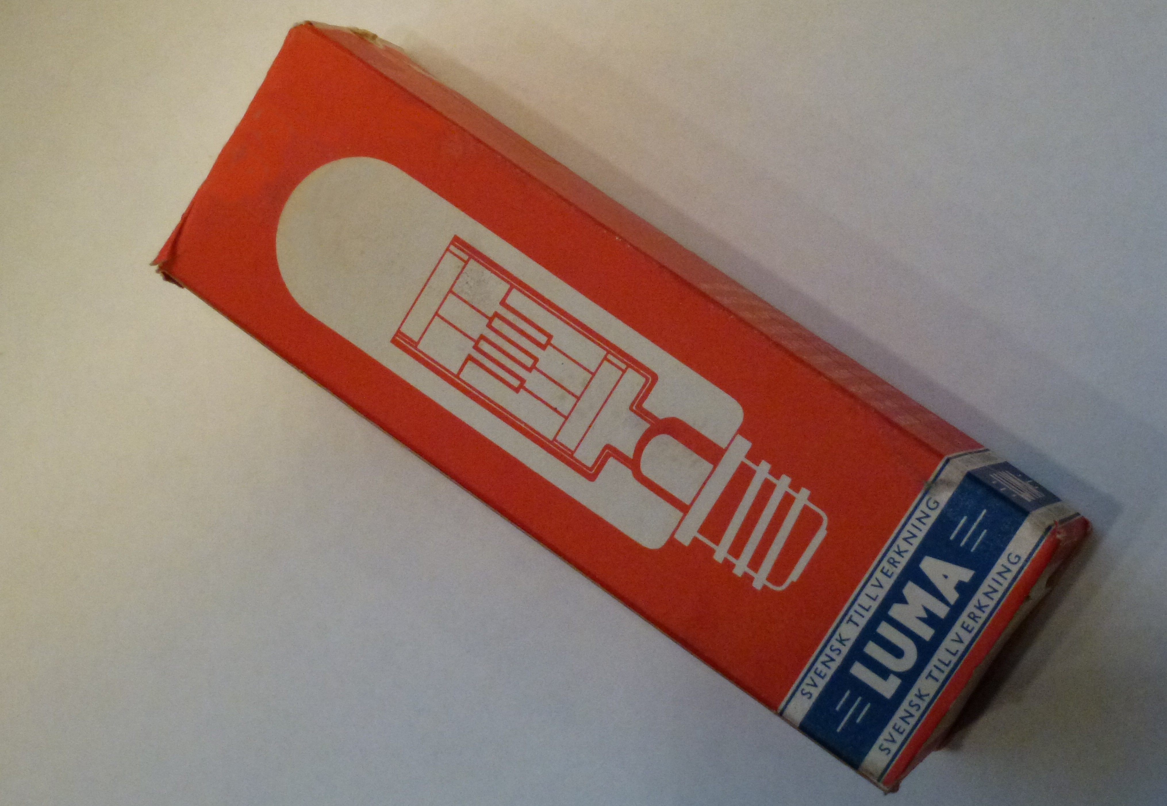 Luma "Svensk tillverkning" lampkartong